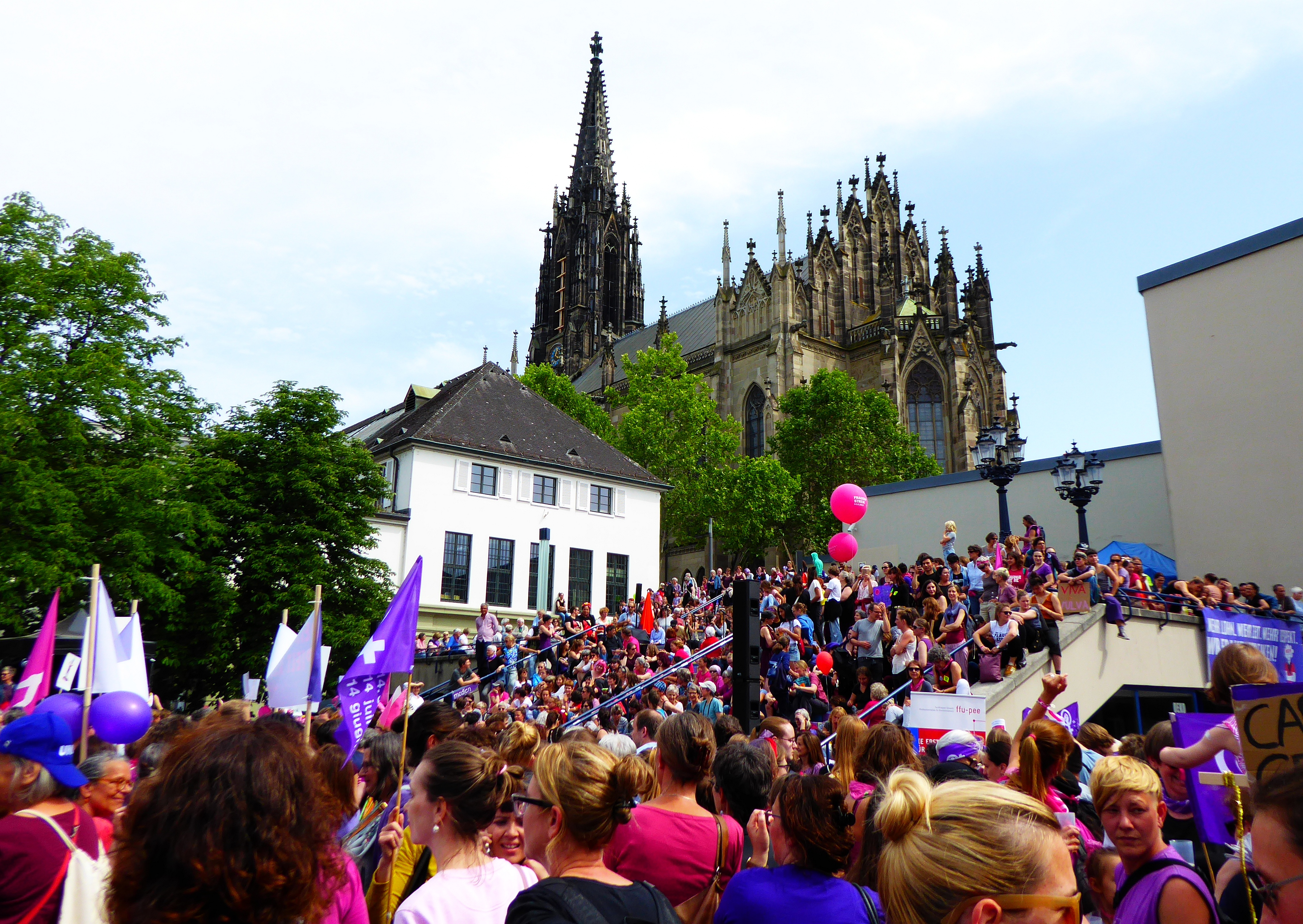 Frauenstreik Basel 2019